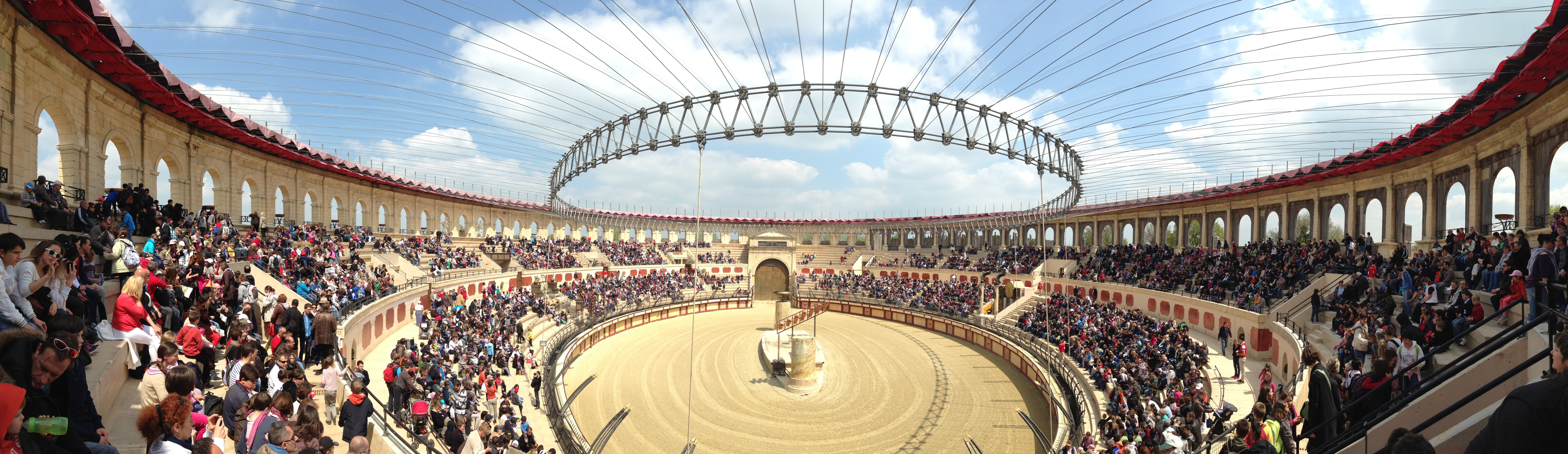 L'arène